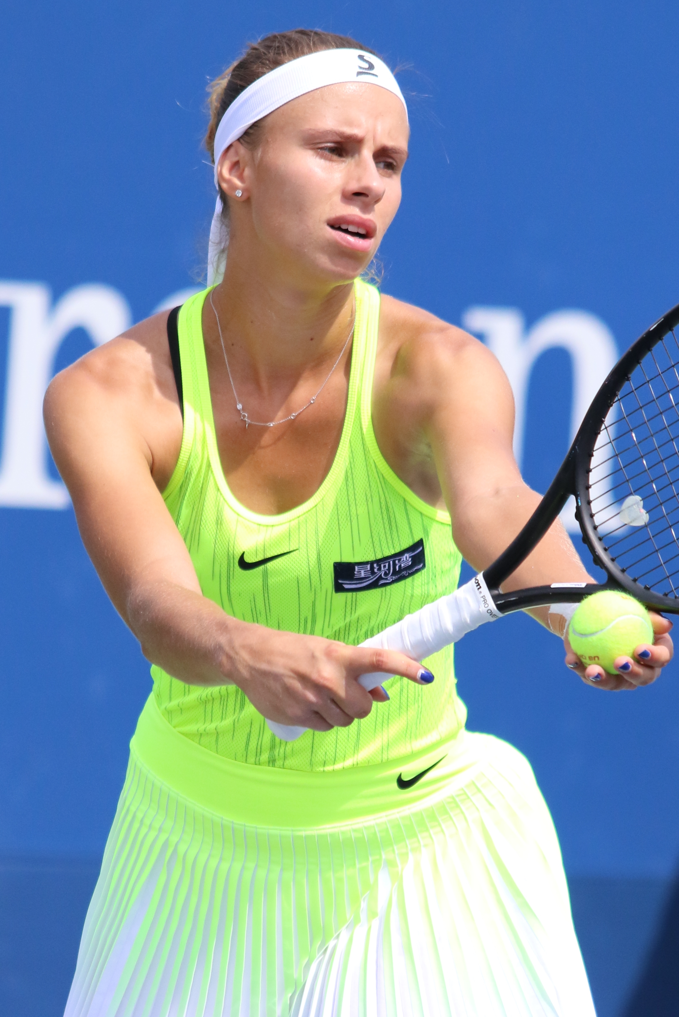 Linette US16 (6)